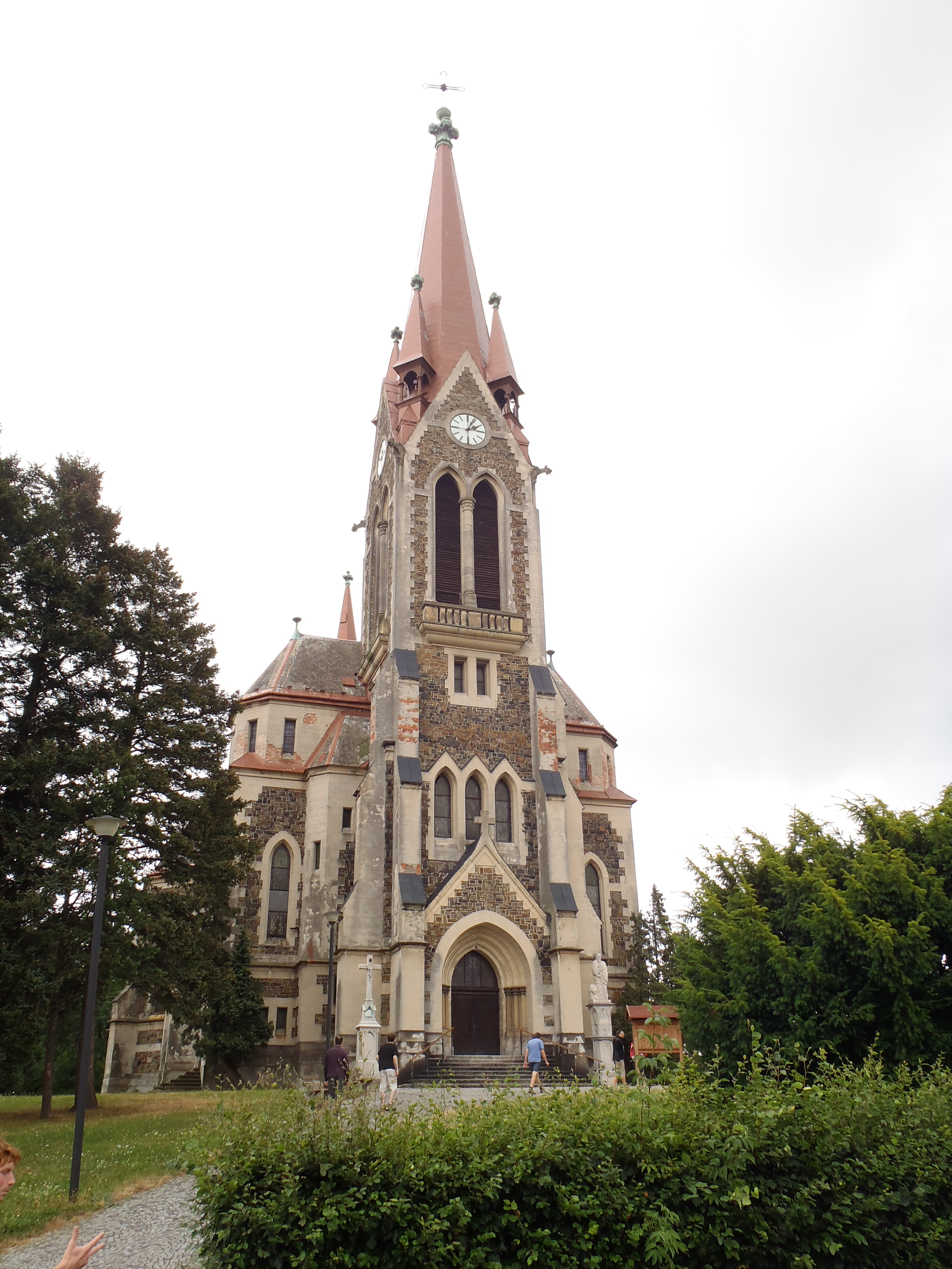 Vítkovský kostel u parku